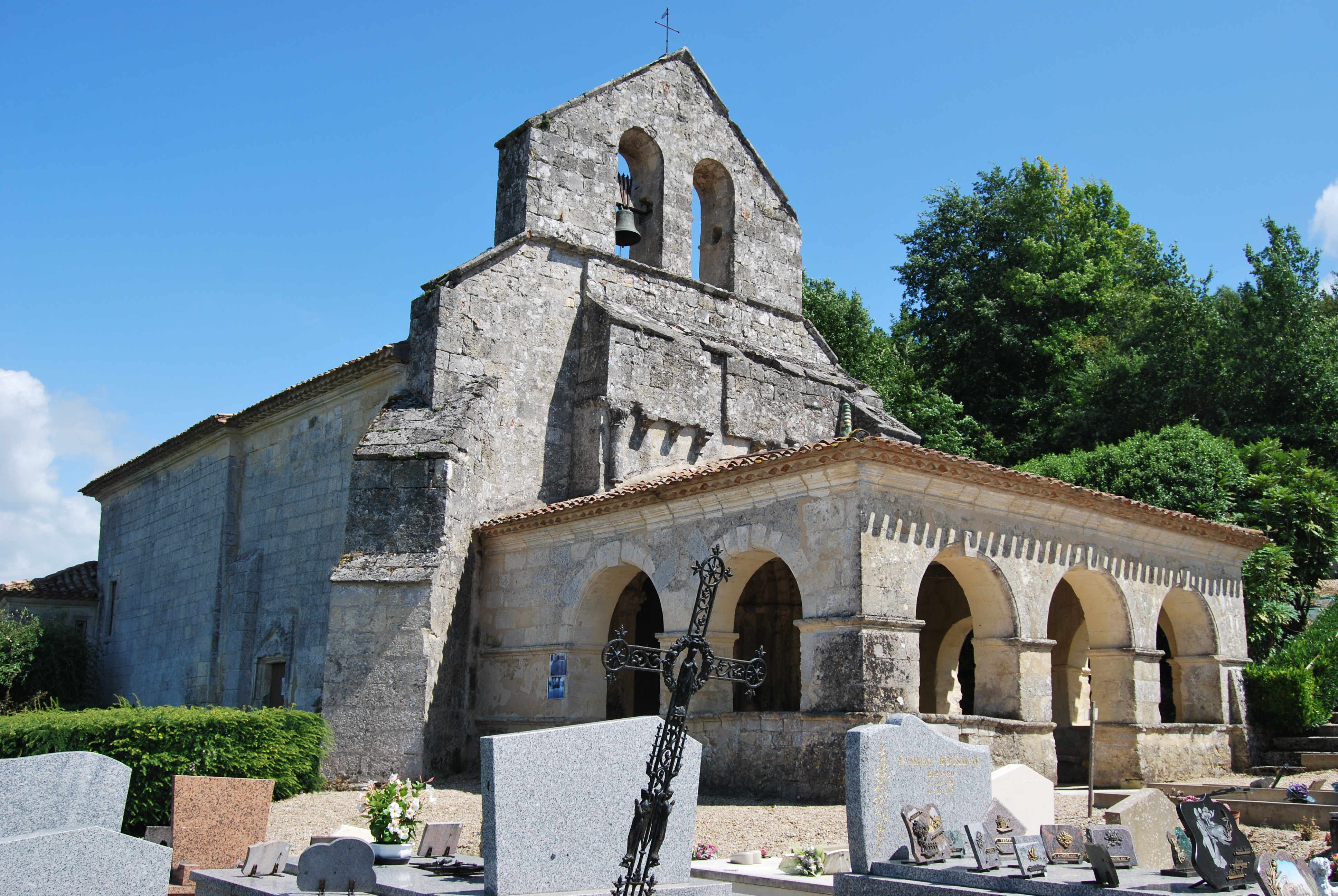 Église de Sainte-Florence